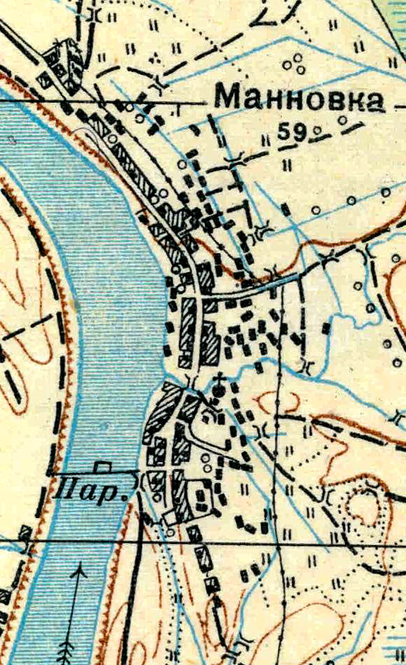 Топографическая карта Ленинградской области, квадрат О-35-21-Г-а (Орлы), деревня Манновка.